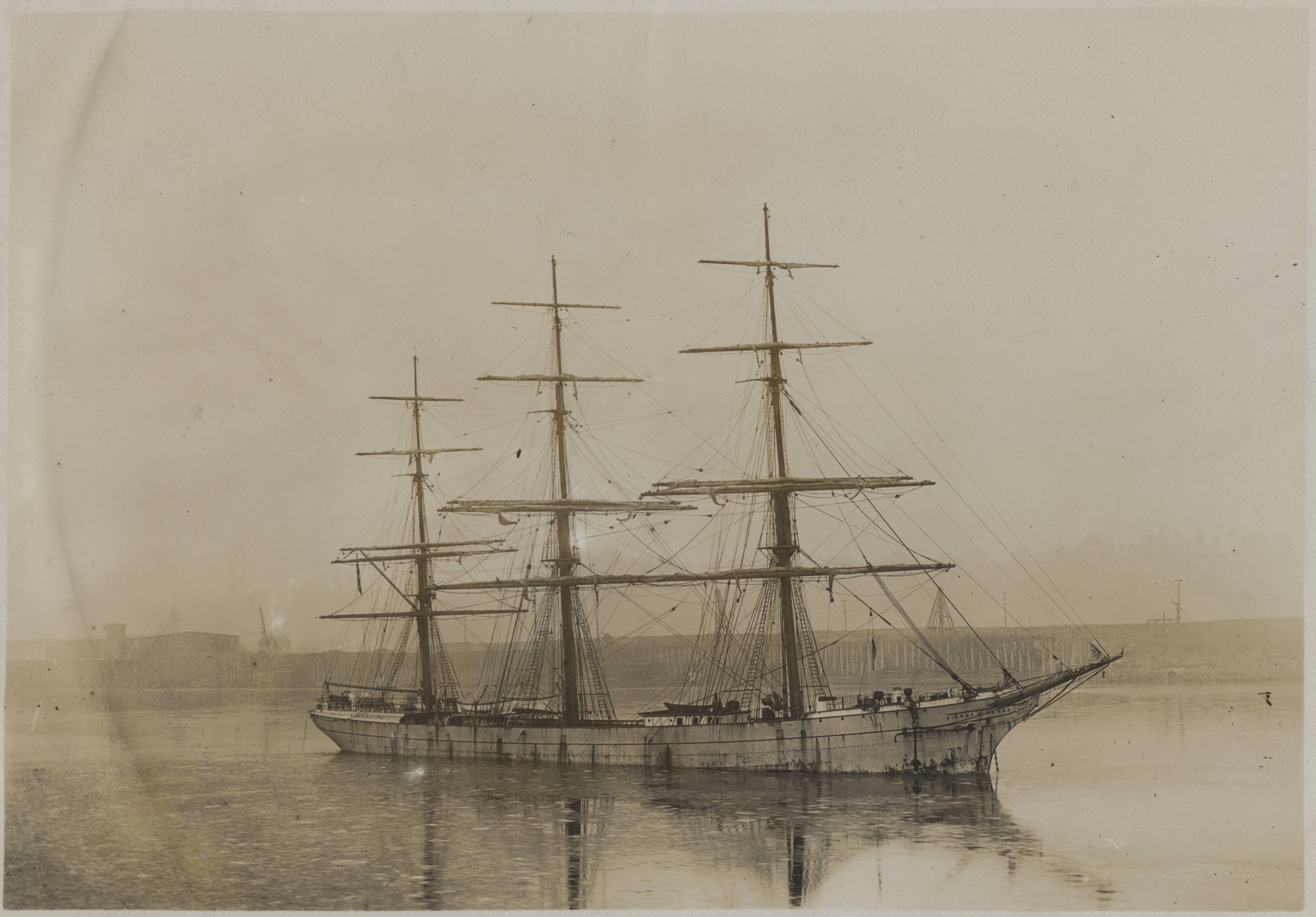 "Sierra Miranda", seilskip, bygd 1884 ved John Reid & Co., Port Glasgow. Skipet ble kjøpt til Norge i 1906 av Andreas Meling i Stavanger. Ble solgt til opphugging i 1921, og var da et av Stavangers siste seilskip. Leif Faaren (1896-1969) fra Åsen (Bygdebok for Åsen bind 4, s., 207) var mannskap på dette skipet i 1913-1914. Skipslister viser at "Sierra Miranda" gikk fra Cape Town i Sør-Afrika 27. november 1914, ankom byen Astoria i Oregon på USAs vestkyst 6. desember og reiste videre fra Portland, Oregon 26. desember. Blant mannskapet da var 18 år gamle Leif Faaren, kokk, mønstret på i Stavanger 17. september 1913. Mannskapet bestod av ti nordmenn, fire briter, tre svensker, en danske, en finne og to tyskere. Fotograf / Photographer: Ukjent Fotoeier / Photo owner: Karen Andøl Faaren Digitalisering / Digitizing: Arne Langås (2015) Foto-ID / Photo ID: 166-0041 Hvis bildet gjengis i andre sammenhenger, oppgi Åsen Museum og Historielag, fotoeier og fotograf som kildereferanse. Har du utfyllende opplysninger? Legg gjerne igjen en kommentar nedenfor eller send e-post til . | If you re-use this photo, please refer to Åsen Museum og Historielag, the photographer and the owner of the photo. Do you have additional information? Please leave a comment or send an e-mail to .